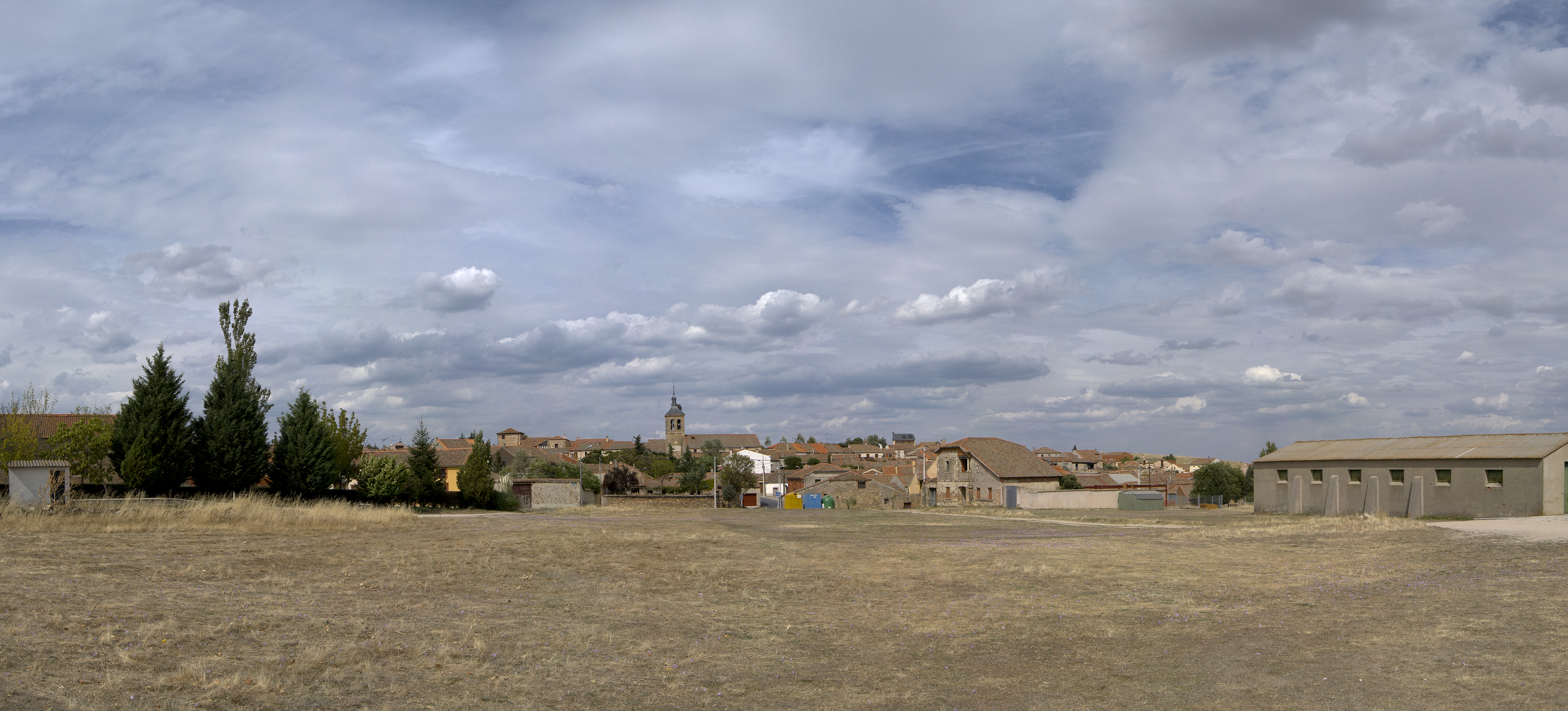 Panoramica de Armuña (segovia)